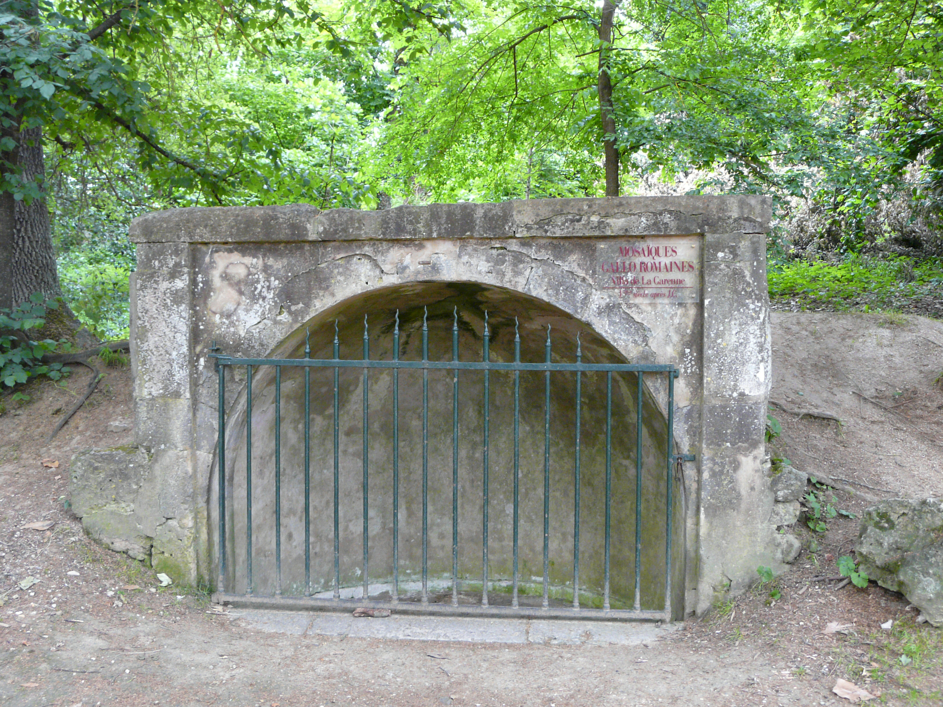 Bâtiment abritant les mosaïques gallo-romaines de Nérac, Lot-et-Garonne, France.